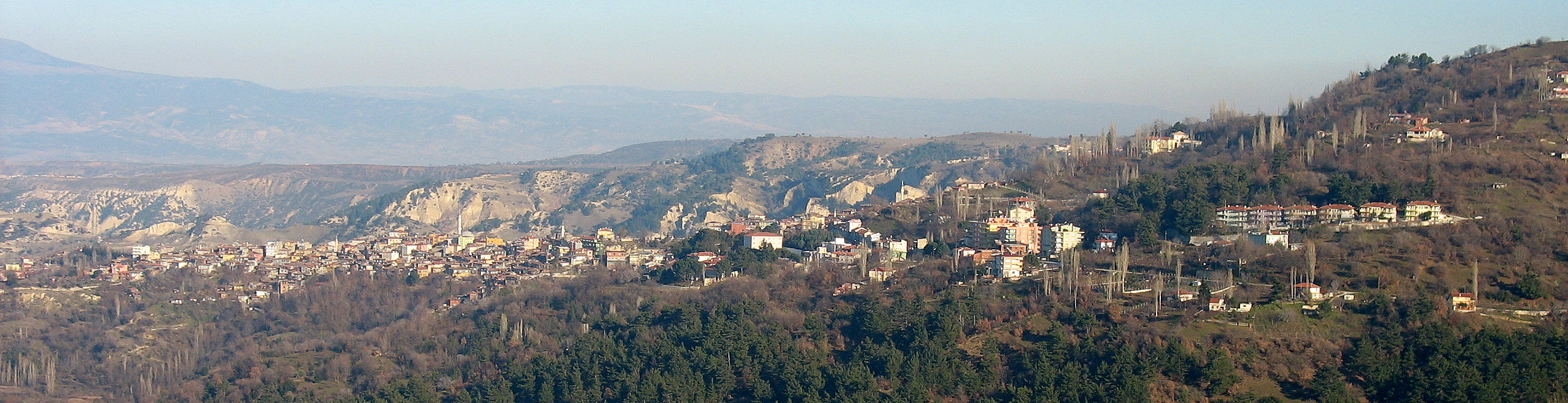 Lisans